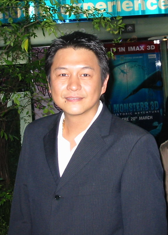 Songsit Rungnopakunsri at Star Entertainment Awards 2007